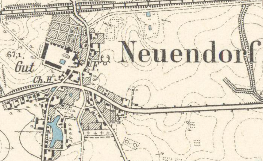 Neuendorf/Gajec, Woiwodschaft Lebus, Polen, Ausschnitt aus dem Messtischblatt 1984 (alte Nr.) Drenzig von 1896